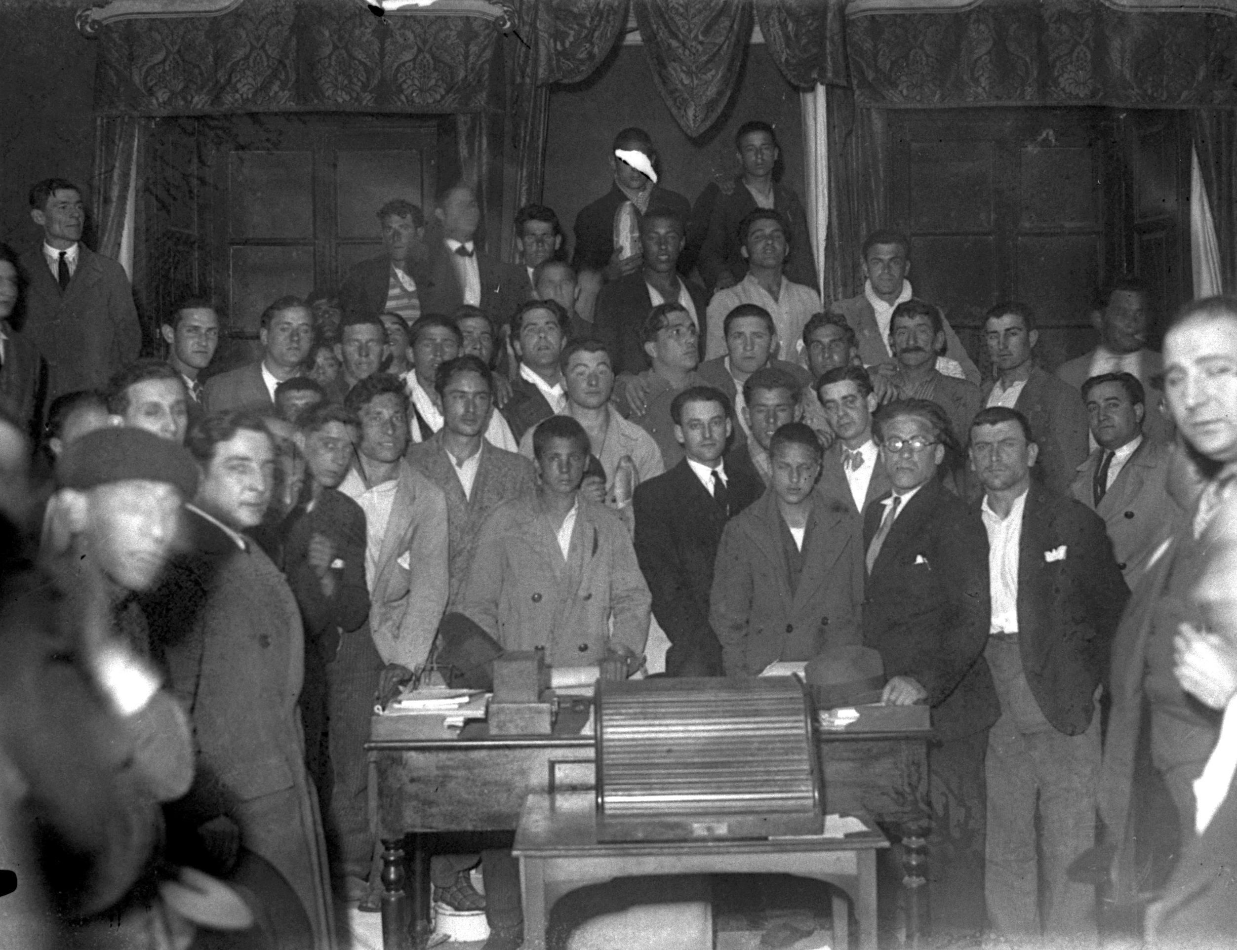 Ateneo Obrero de Gijón. 1928 Constantino Suárez. Muséu del Pueblu d'Asturies